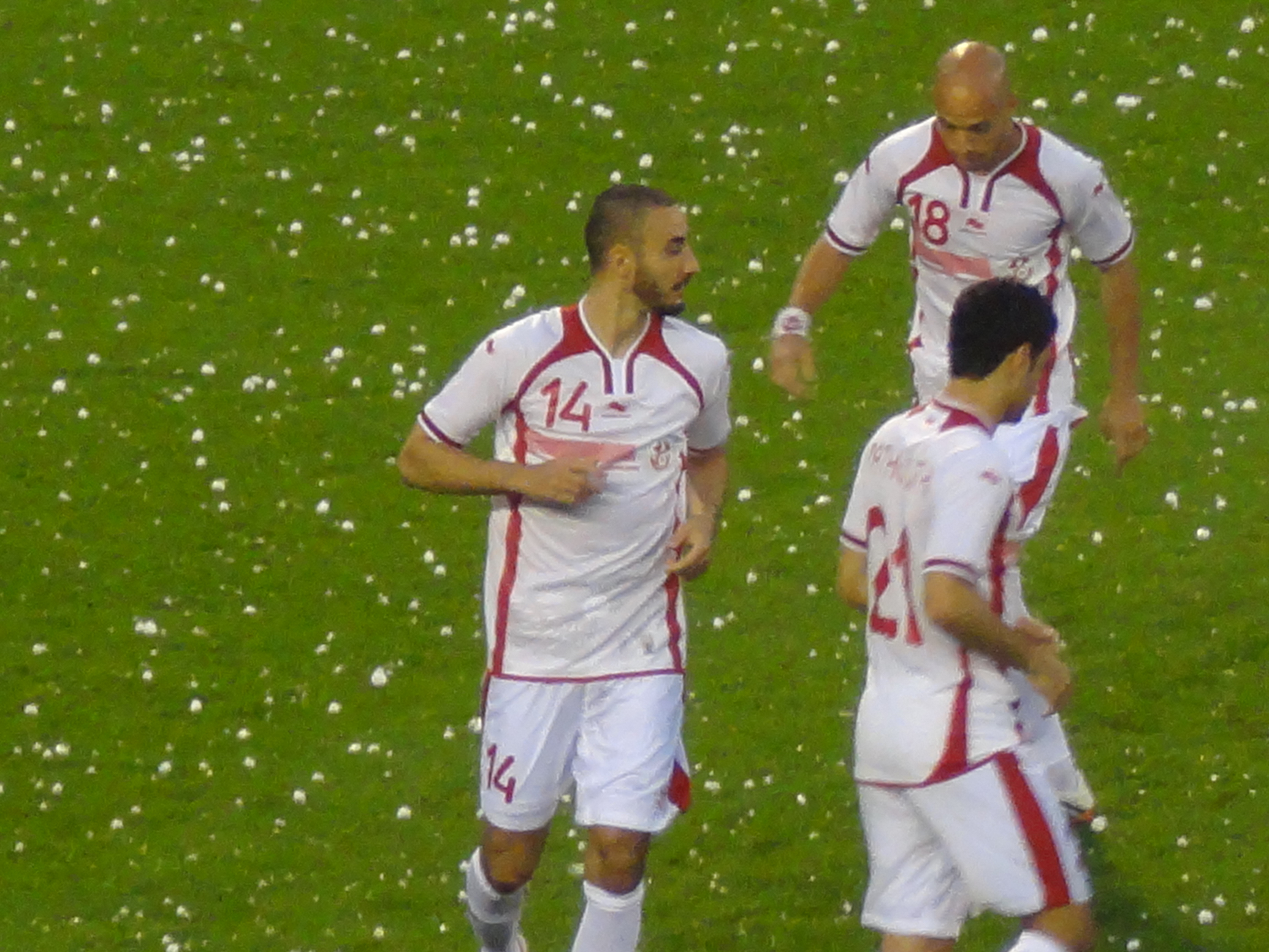 Houcine Nater